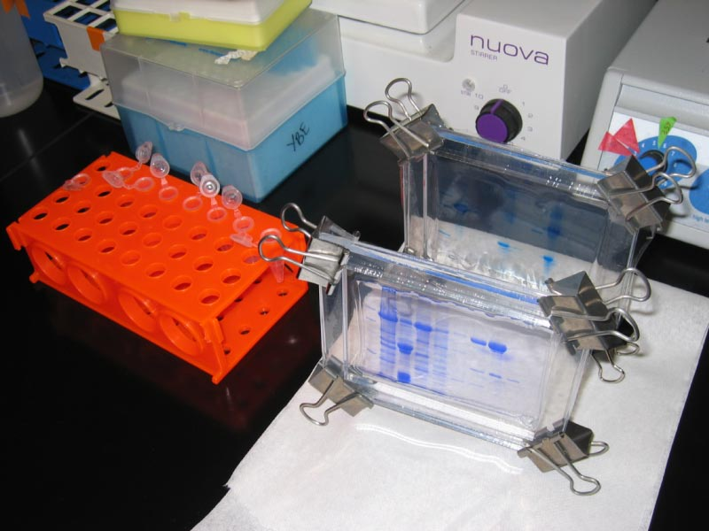 Gel Blue Coomassie.